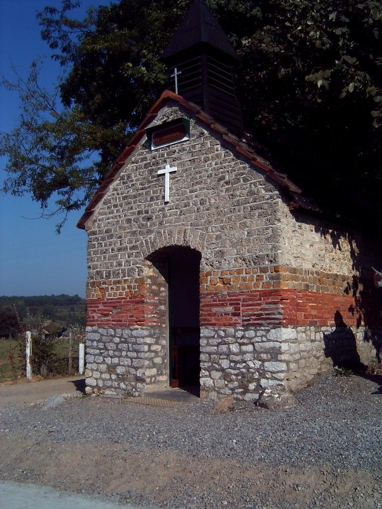 Limburgs: Sjoppem, de Steenboskapel foto Els Diederen 2004 Aelske